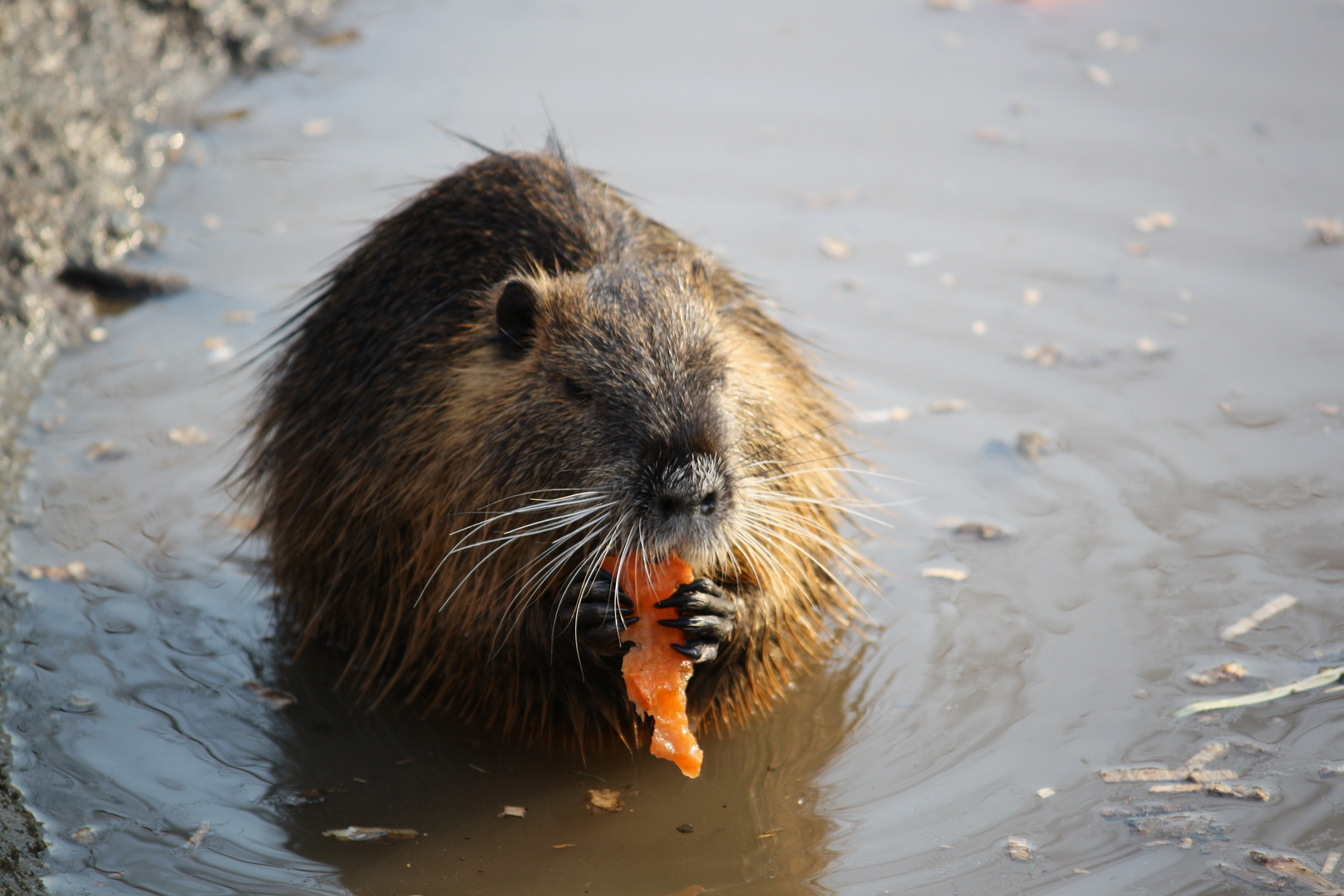 Pražská zoologická zahrada - nutrie pojídající mrkev v dětské zoo